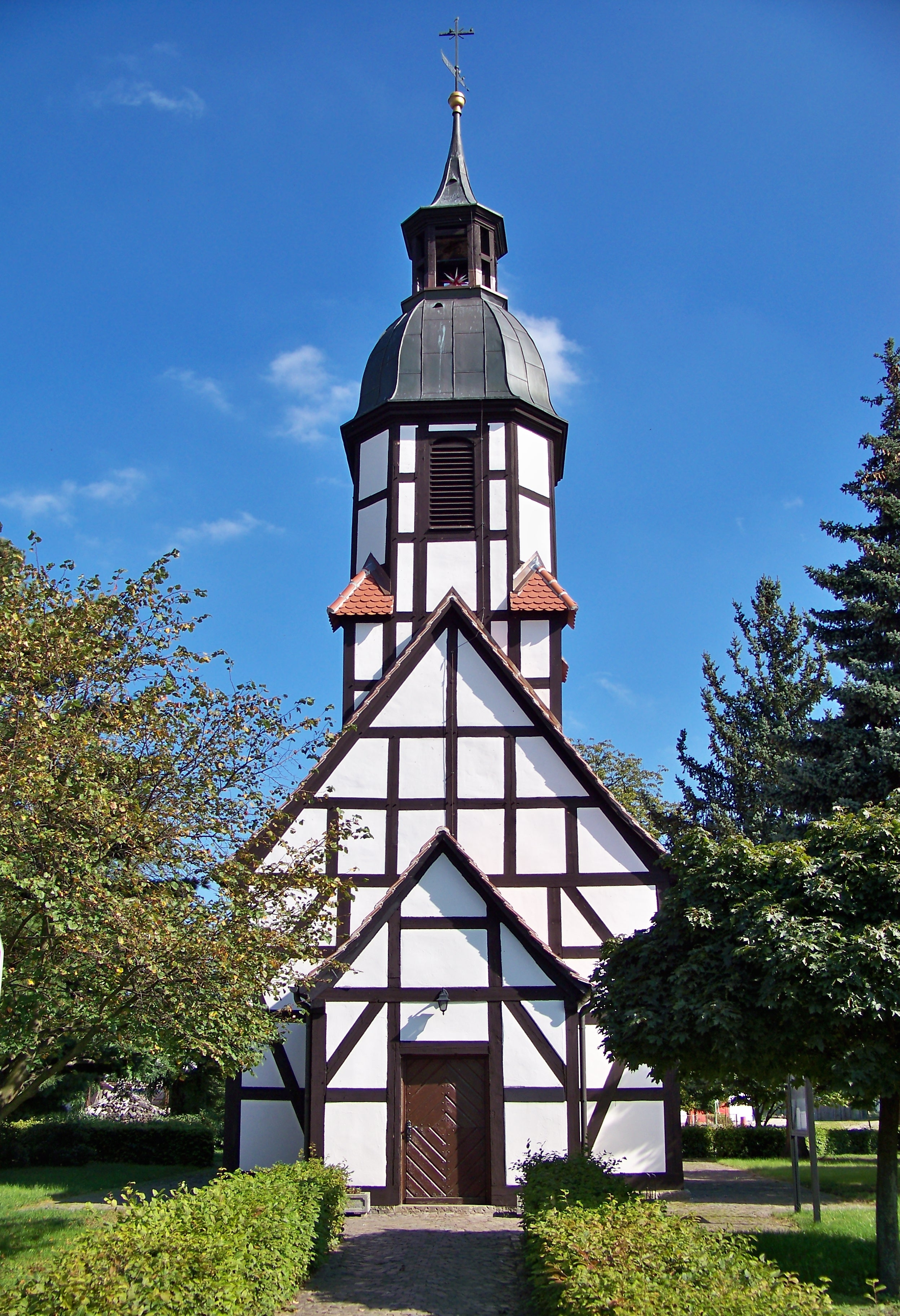 Fachwerk-Kirche in Löhsten (Herzberg/Elster)